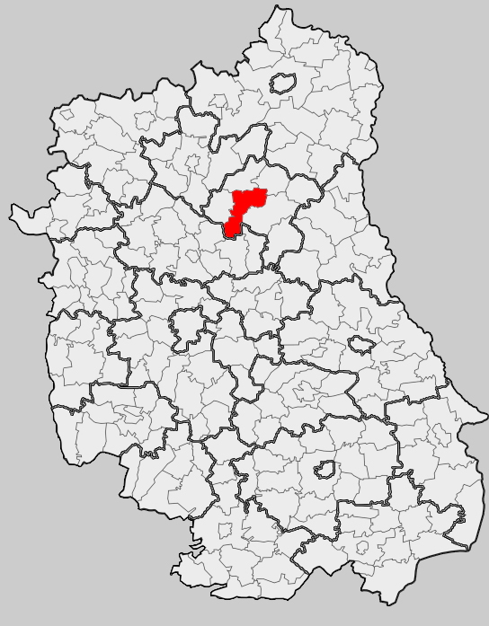 Map of gmina Parczew, Parczew county, Lublin voivodship Mapa gminy Parczew, powiat parczewski, województwo lubelskie